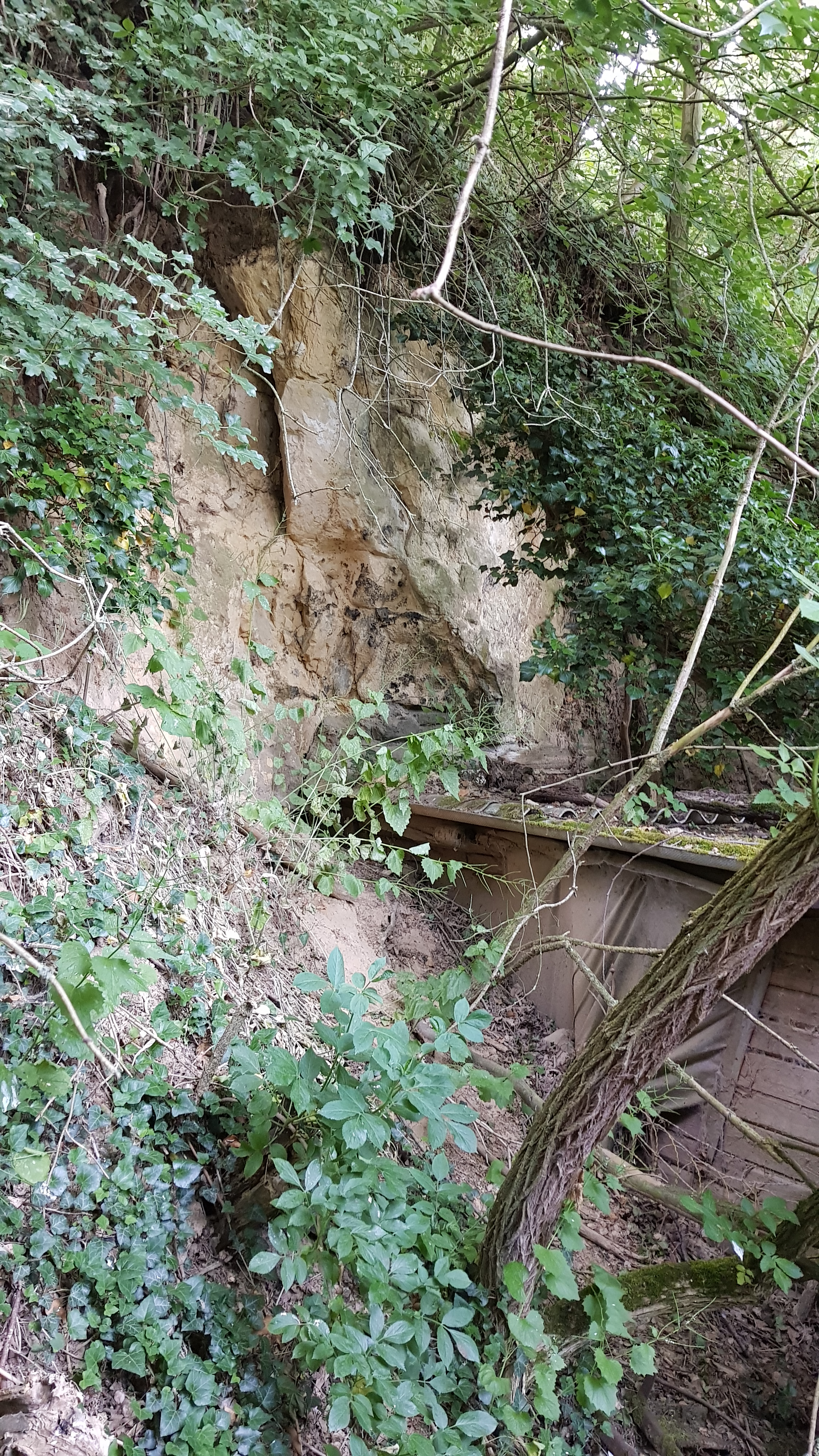 Nevenschaelsberggroeve, Valkenburg, Nederland